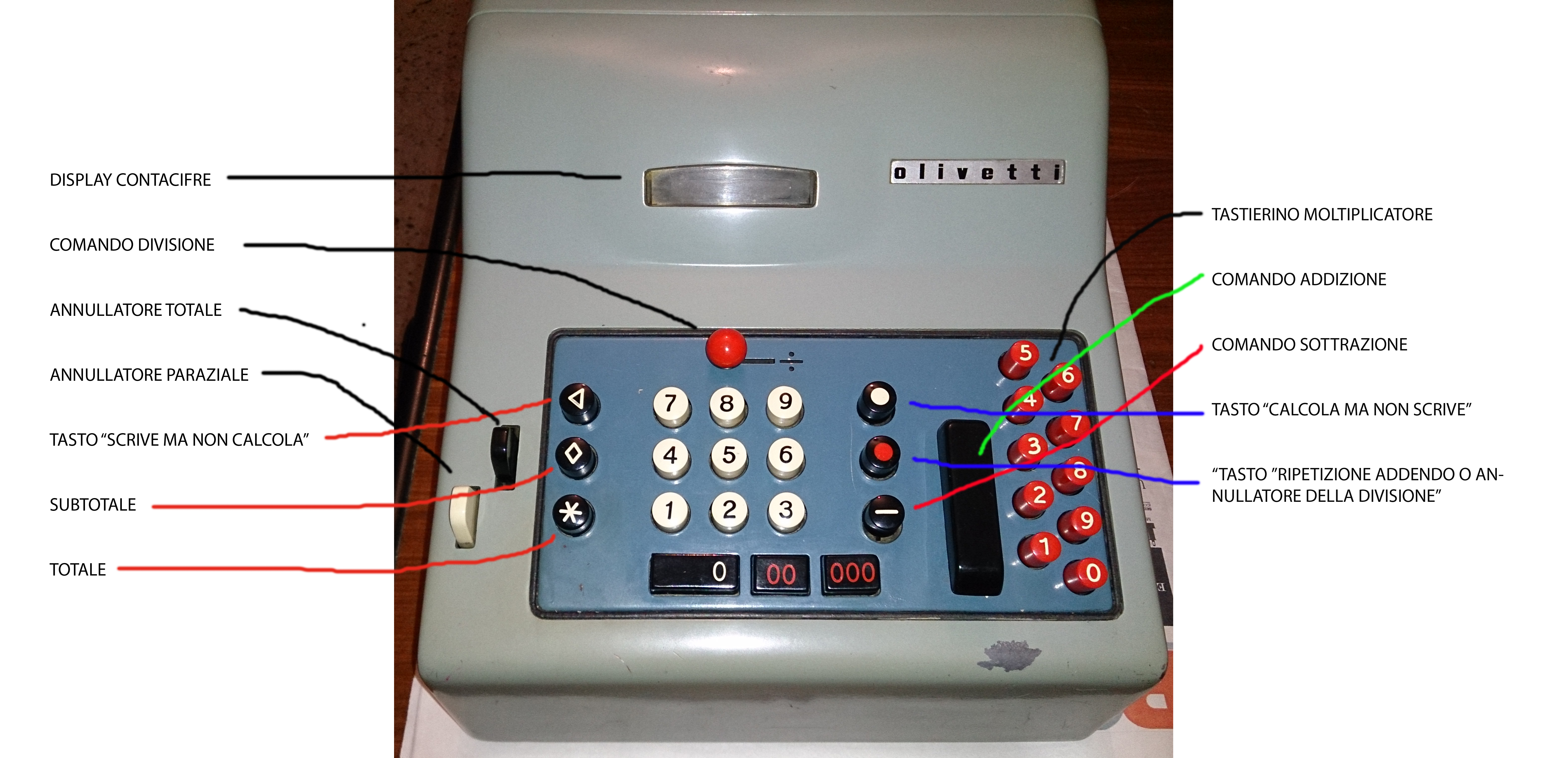 foto esplicativa dei comandi della calcolatrice divisumma 14; foto mia